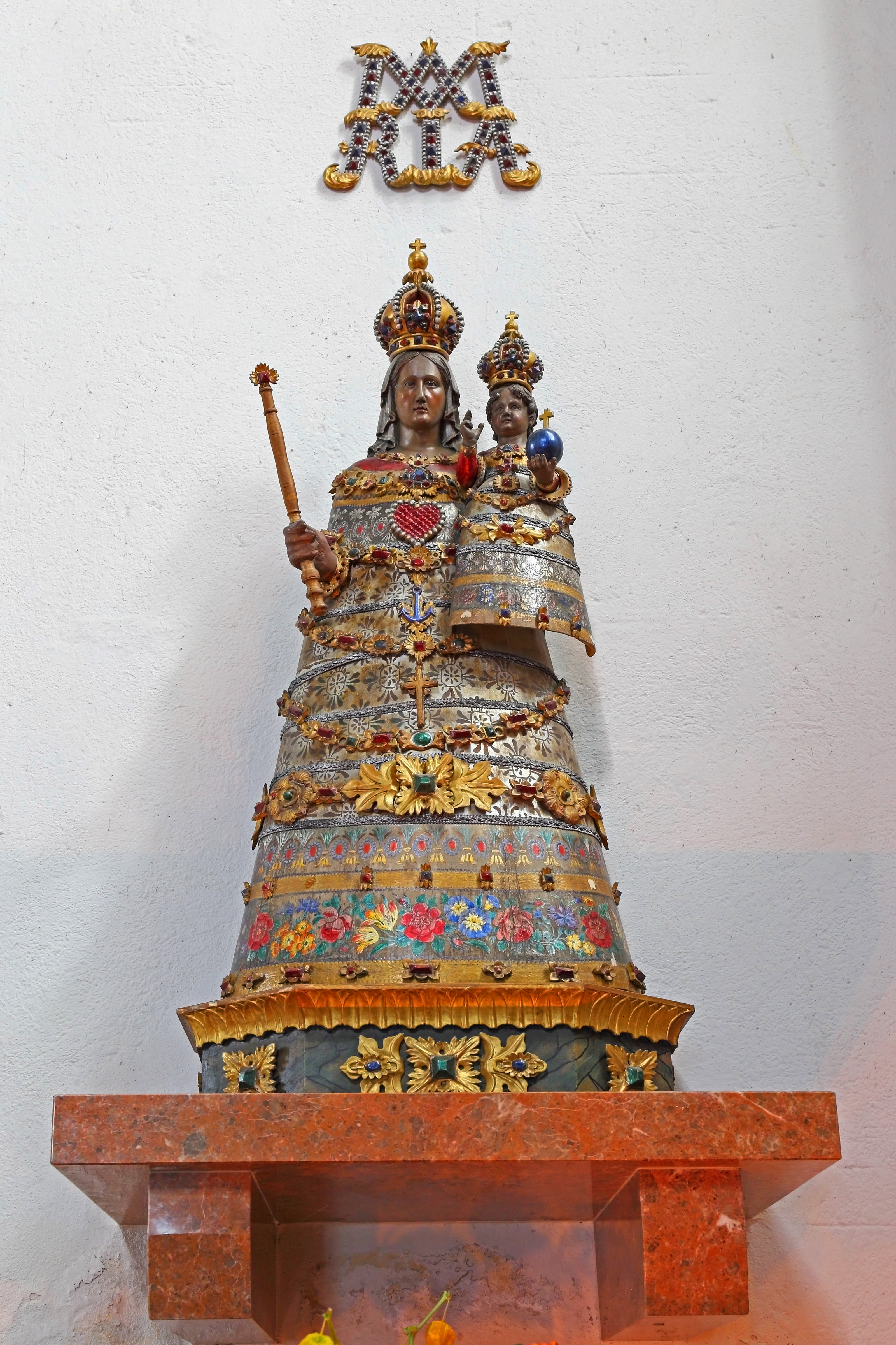 Loretomadonna von Max Tendler aus dem Jahr 1839 auf dem rechten Seitenaltar der Kirchenfestungsanlage hl. Oswald in Eisenerz